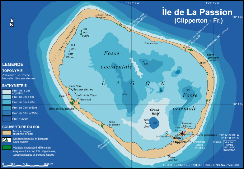 fonte